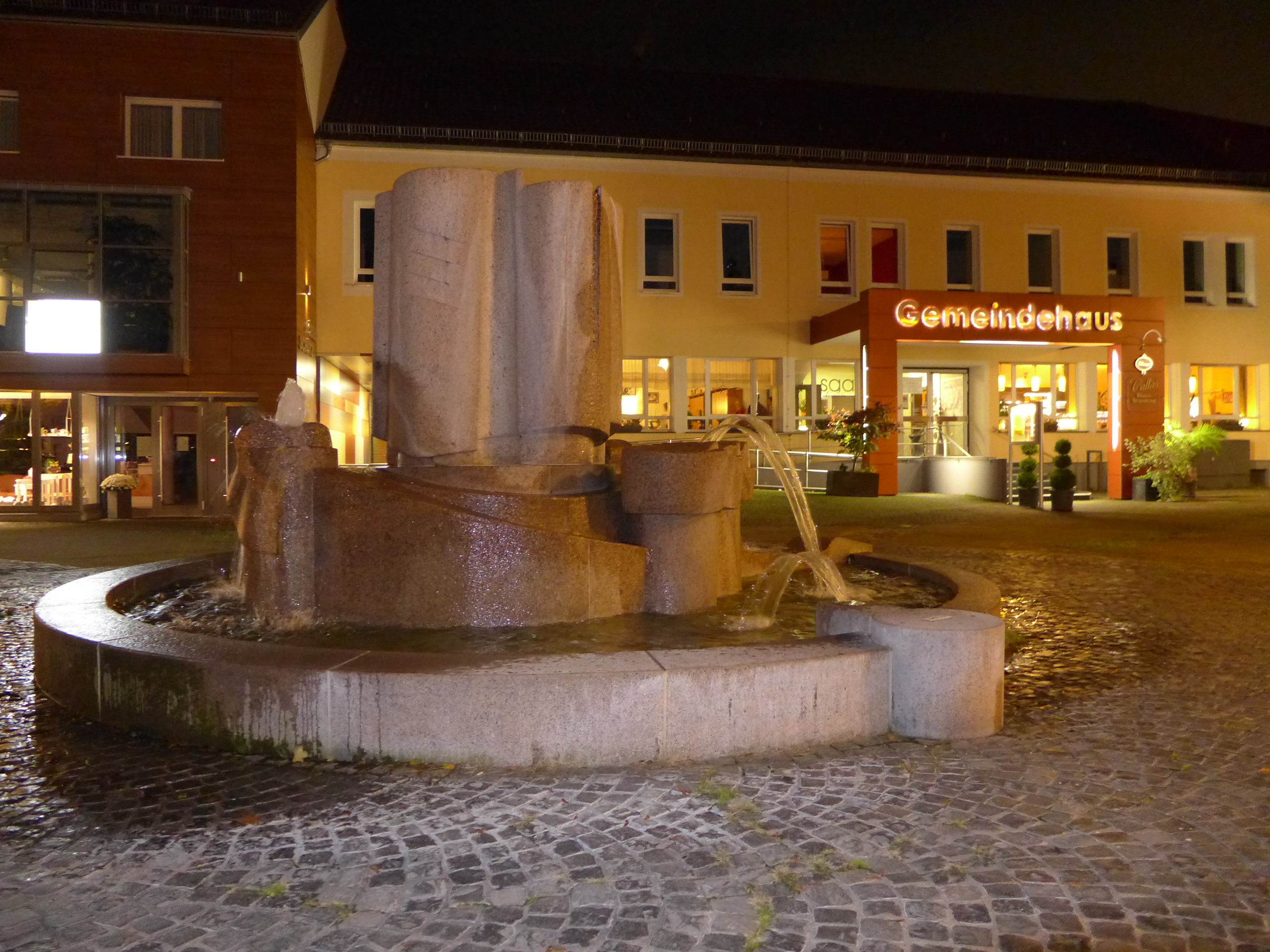 Gemeindehaus in Diefflen mit Oliberius-Brunnenanlage